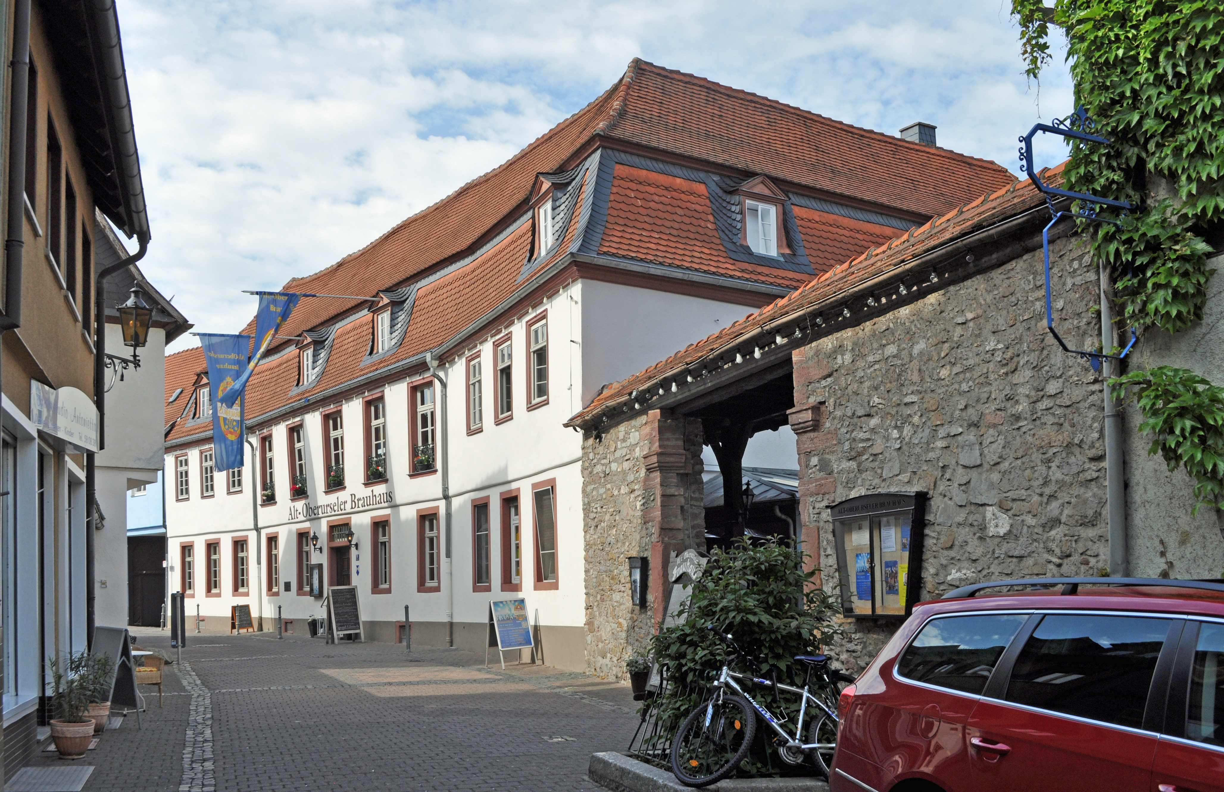 Oberursel, Ackergasse 13, Alt-Oberurseler Brauhaus